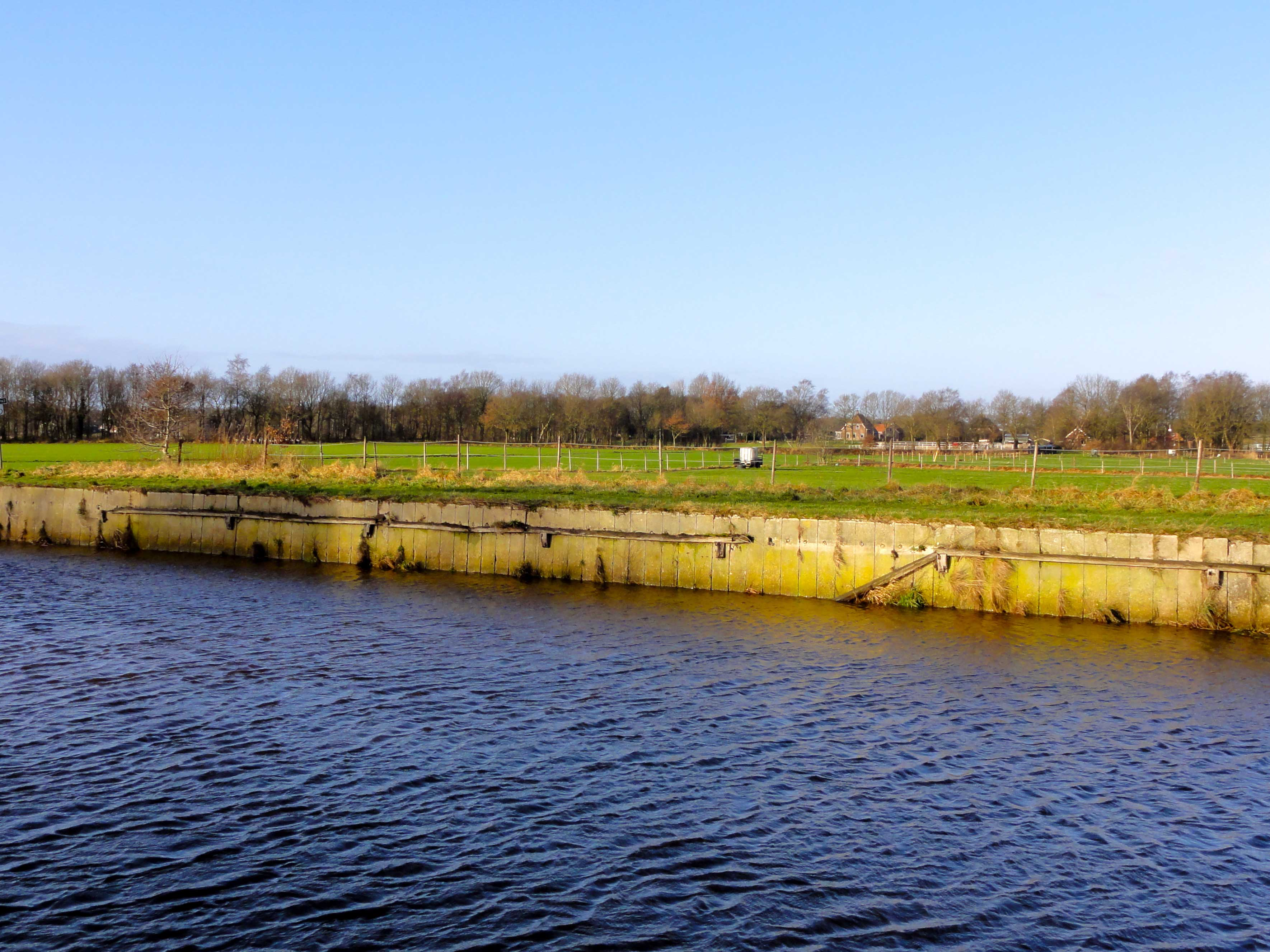 Restanten loskade Kanaal Buinen-Schoonoord nabij Bronneger